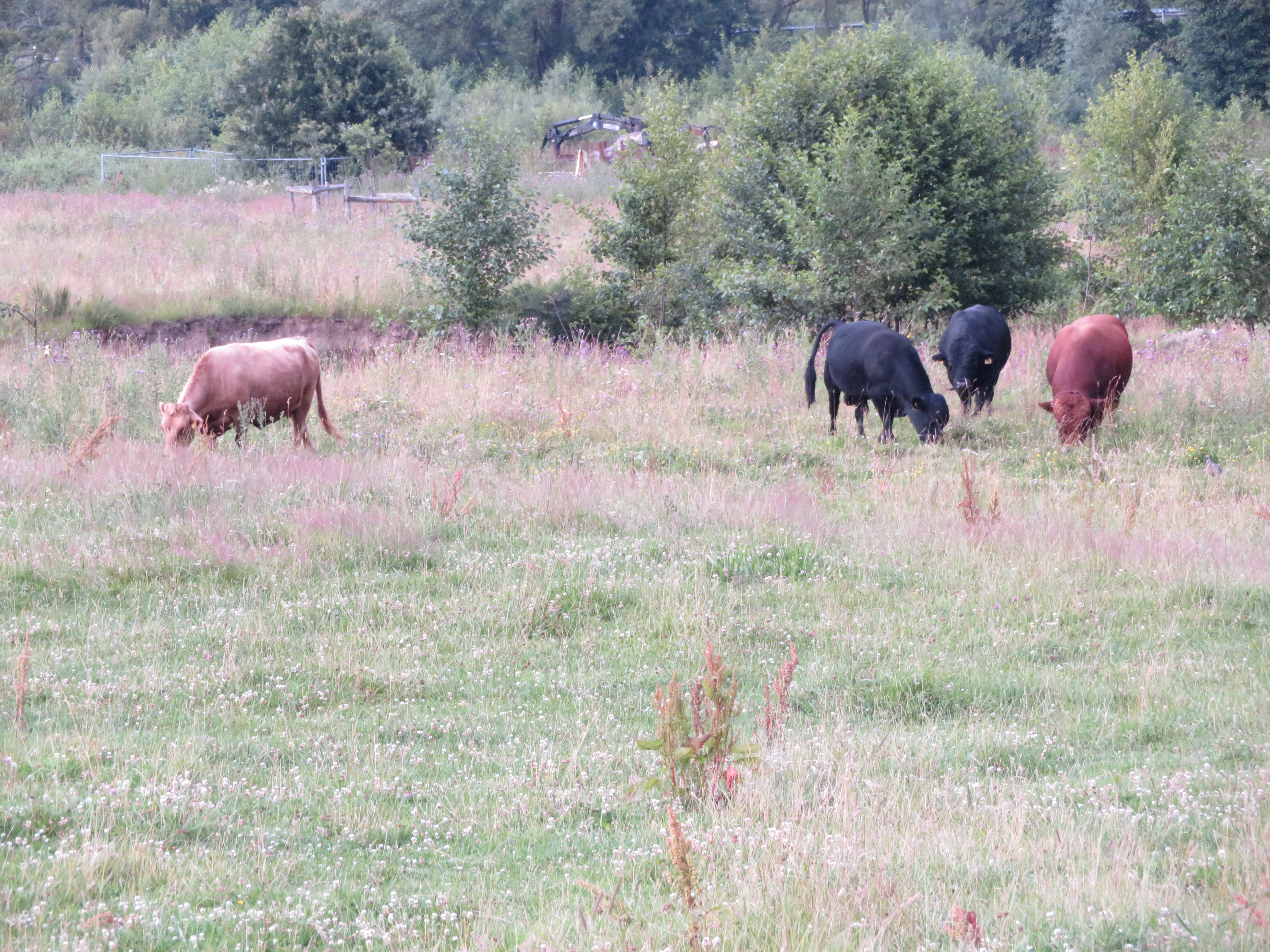 Landschaftsschutzgebiet Sorpewiesen Lange Erlen​ mit Dexter-Rindern.